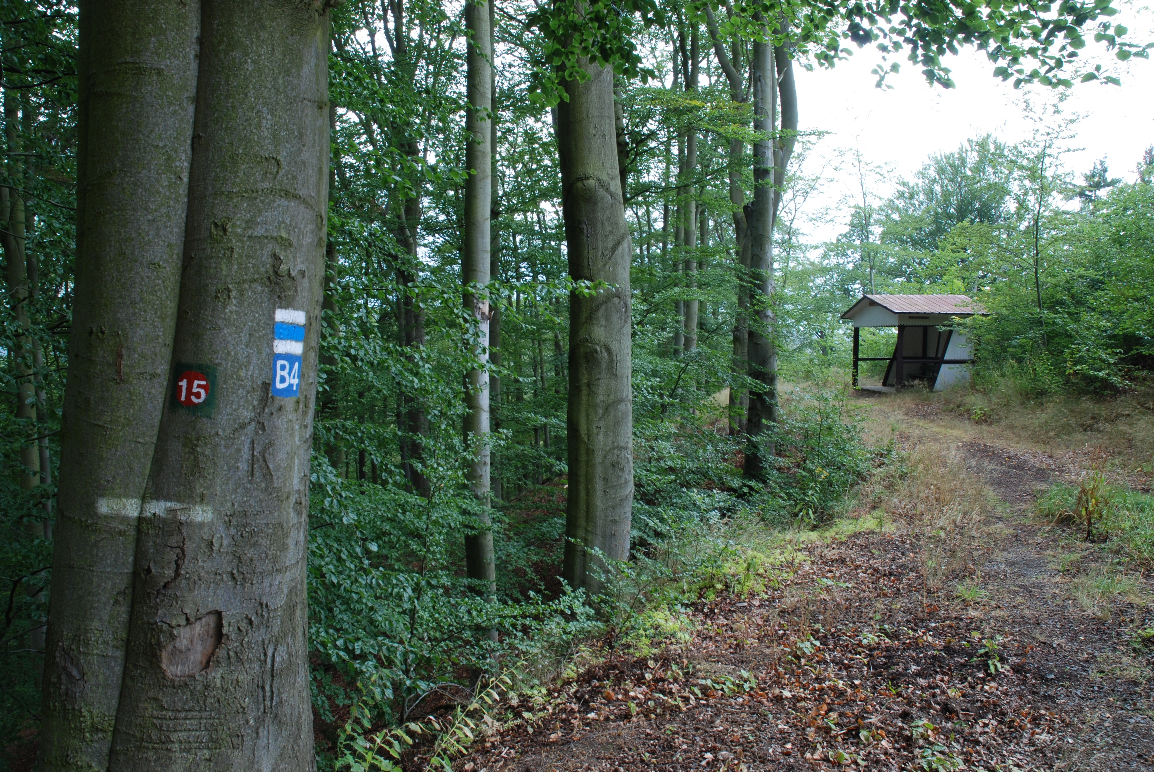 Chata U Černé Marie v lázeňských lesích při Beethovenově stezce